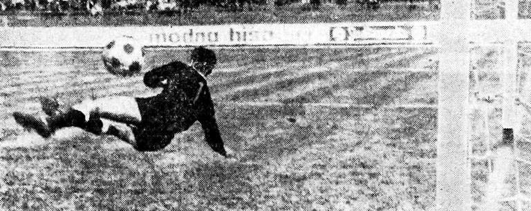 Alfonz Horvatič(1942-) na prijateljski tekmi NK Maribor - Austria Celovec